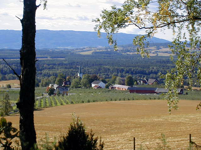 Utsikt fra Stavhella på Norderhov i Ringerike